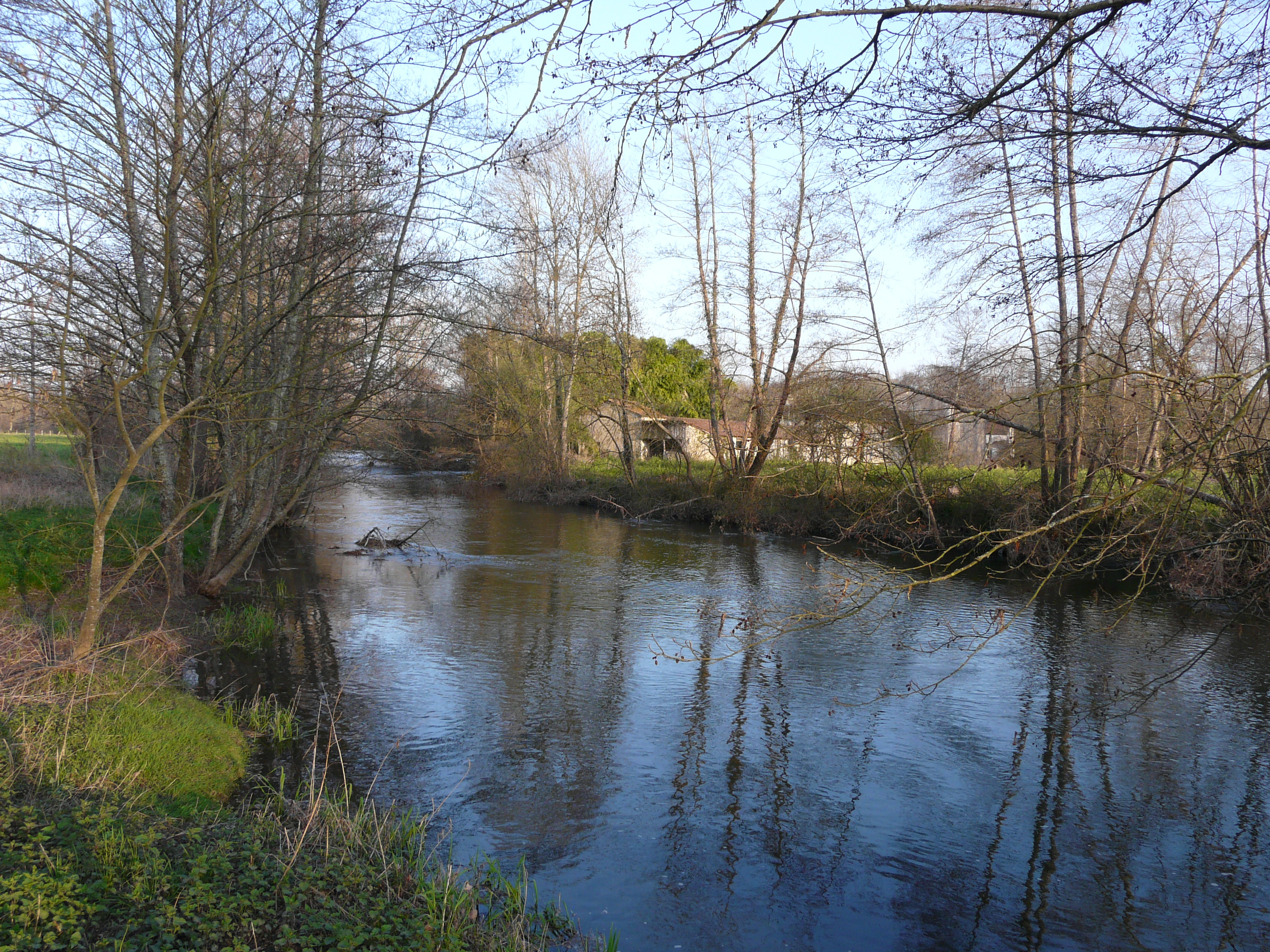 La Dronne au lieu-dit les Rivières entre Saint-Victor (au premier plan) et Tocane-Saint-Apre (sur la rive opposée), Dordogne, France. Vue prise en direction de l'amont.